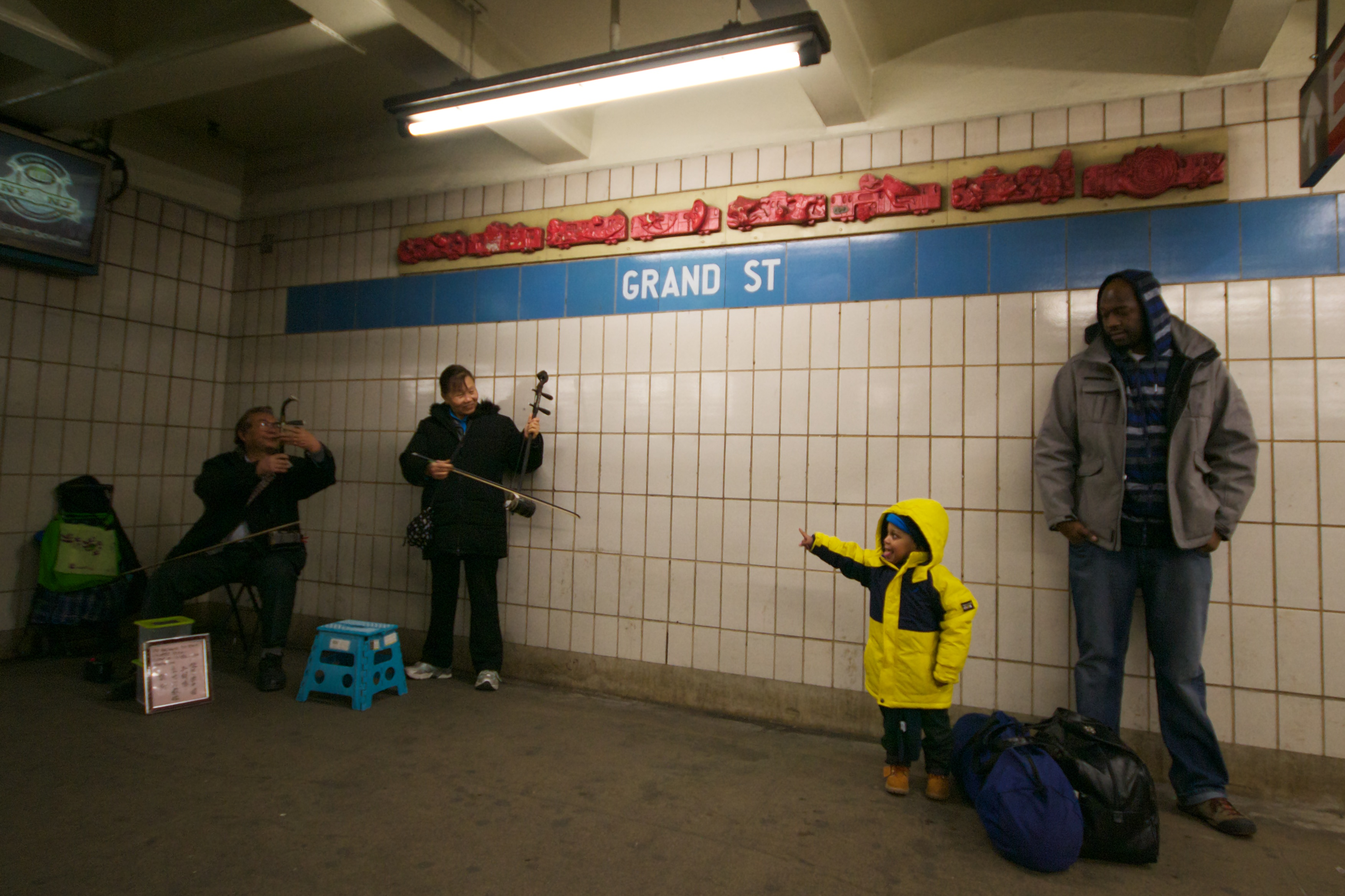 At Grand St subway station in NY, a women propose a kid to play a traditional Chinese instrument. _________________________________________________________________________ À la station Grand St dans le Chinatown de New-York, une dame propose à un enfant d'essayer de jouer d'un instrument traditionnel chinois. Une citation qui convient bien pour cette image : "et j'ai gardé pour moi tout seul cette tendre image dans mon cœur, et aujourd'hui jusqu'au linceul, ce sera celle du bonheur" Yves Duteil.